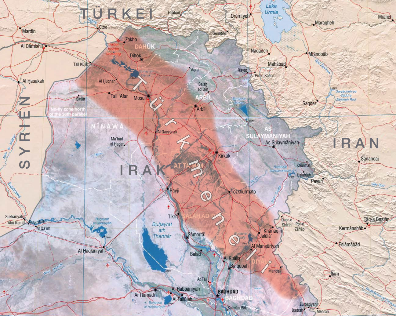 Karte von Türkmeneli